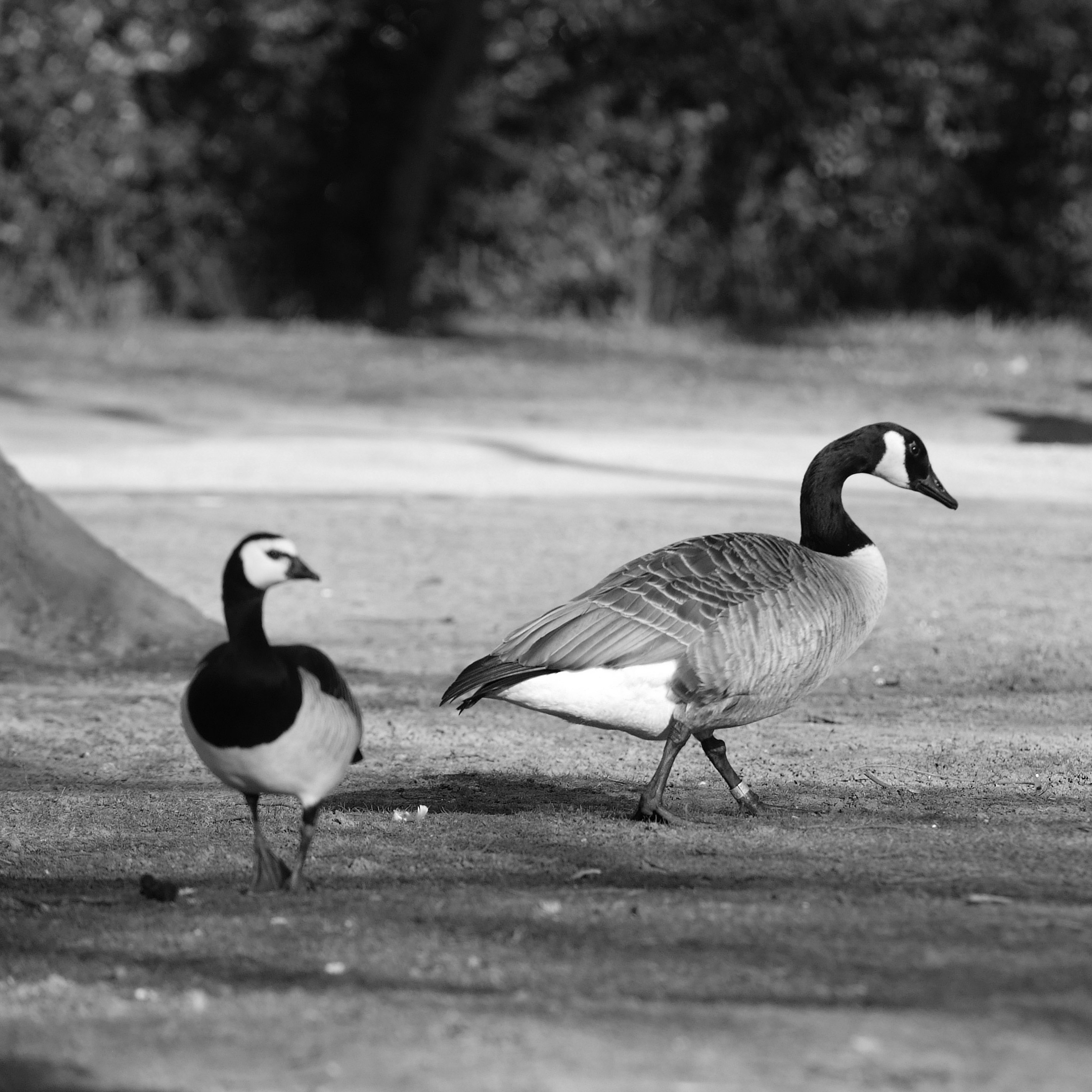 Branta canadensis and Branta leucopsis